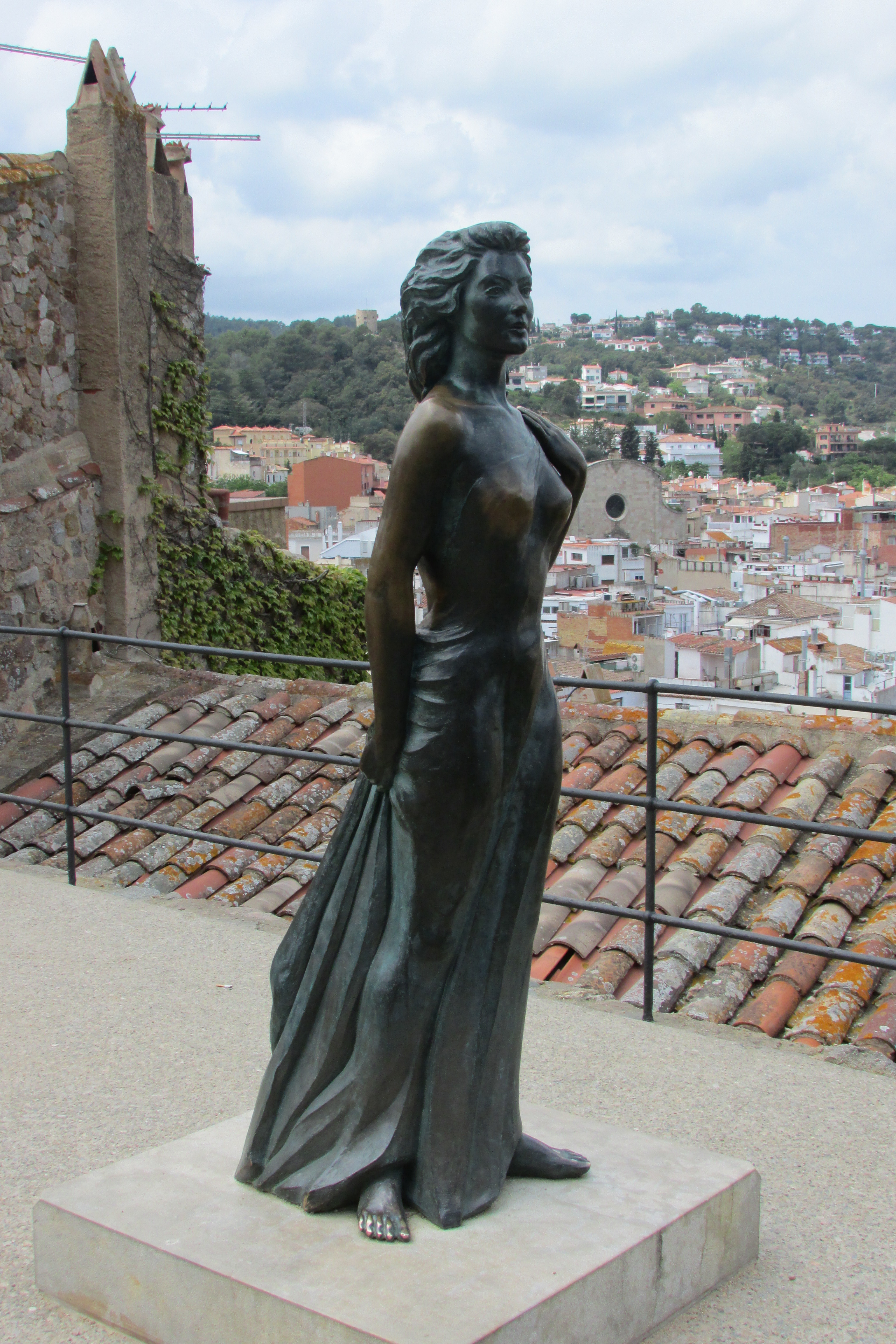 פסל בדמותה של אווה גרדנר מוצבמחוץ לביתה בעיירה טוסה דה מאר, ספרד